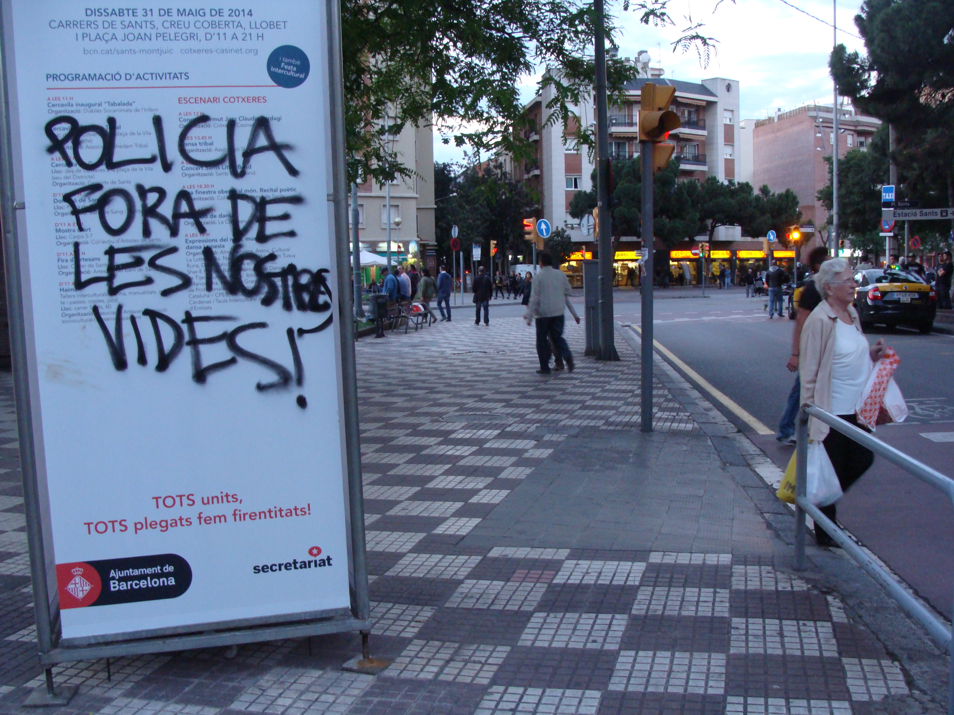 Protestes per Can Vies, al carrer i plaça de Sants